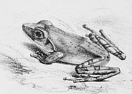 Pseudophilautus temporalis